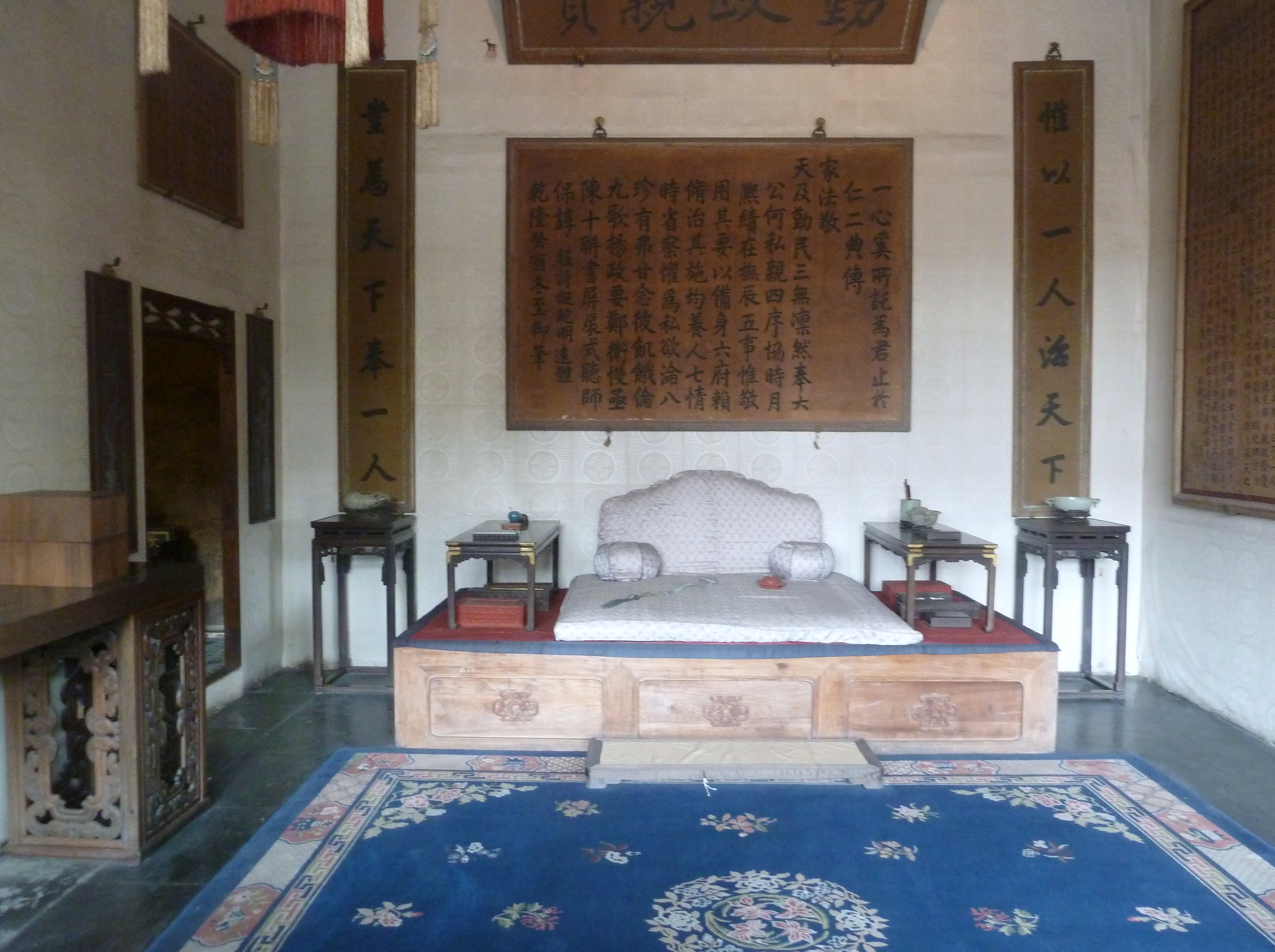 Dans la Cité_interdite, à Pékin .-, Chine